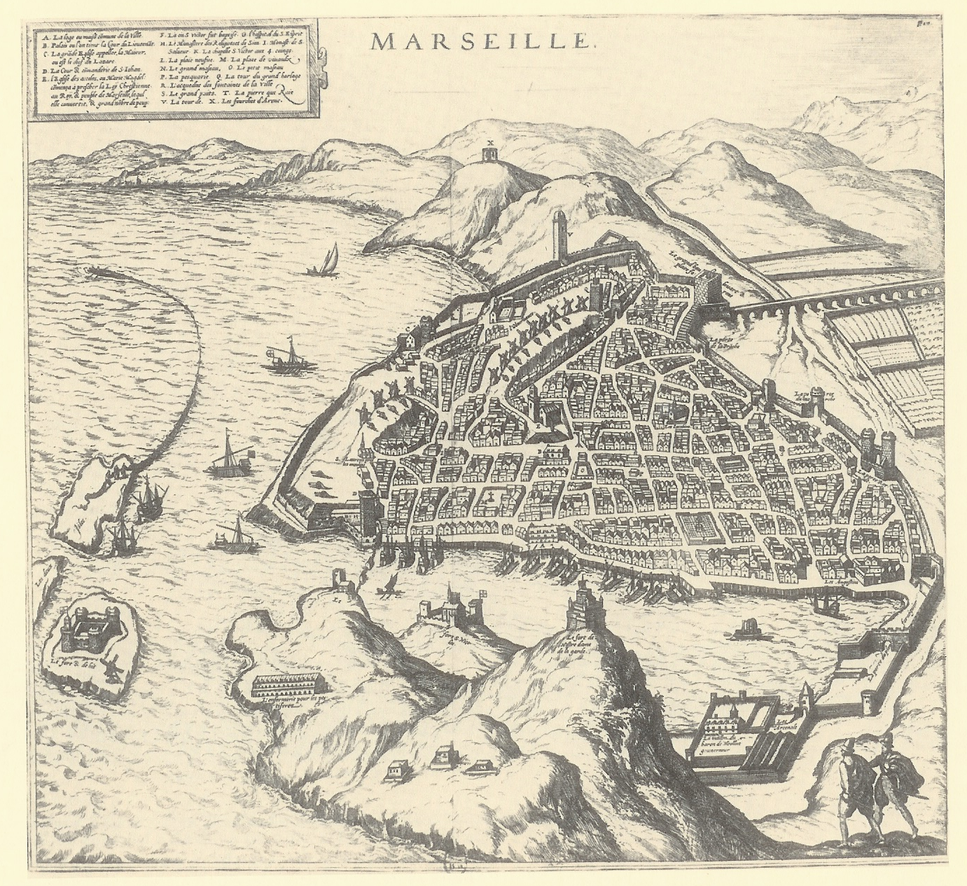 Plan de Marseille en 1572. Gravue de 32,5x36cm issue de "G. Braun Civitates Orbis Terrarum" (Bibliothèque Nationale) Une de cette image est disponible sur : File:Marseille en 1575.jpg 1572